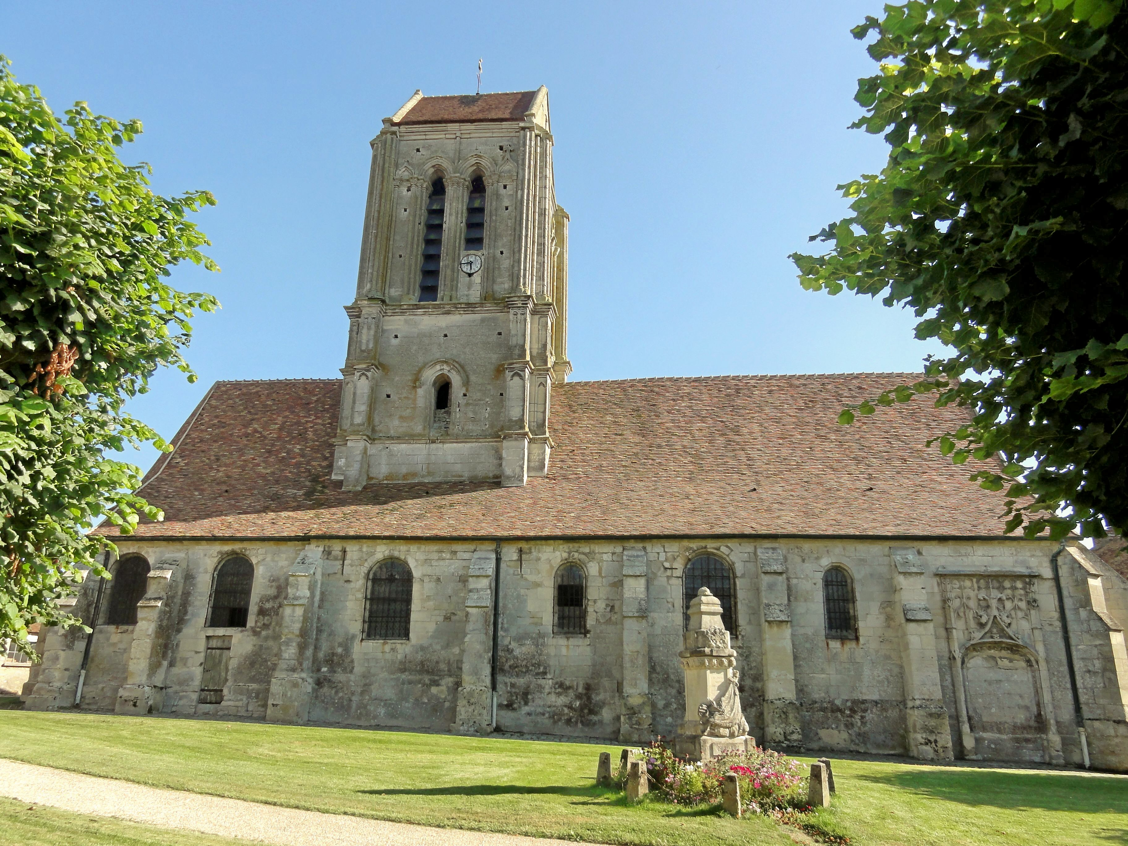 Vue depuis le nord.